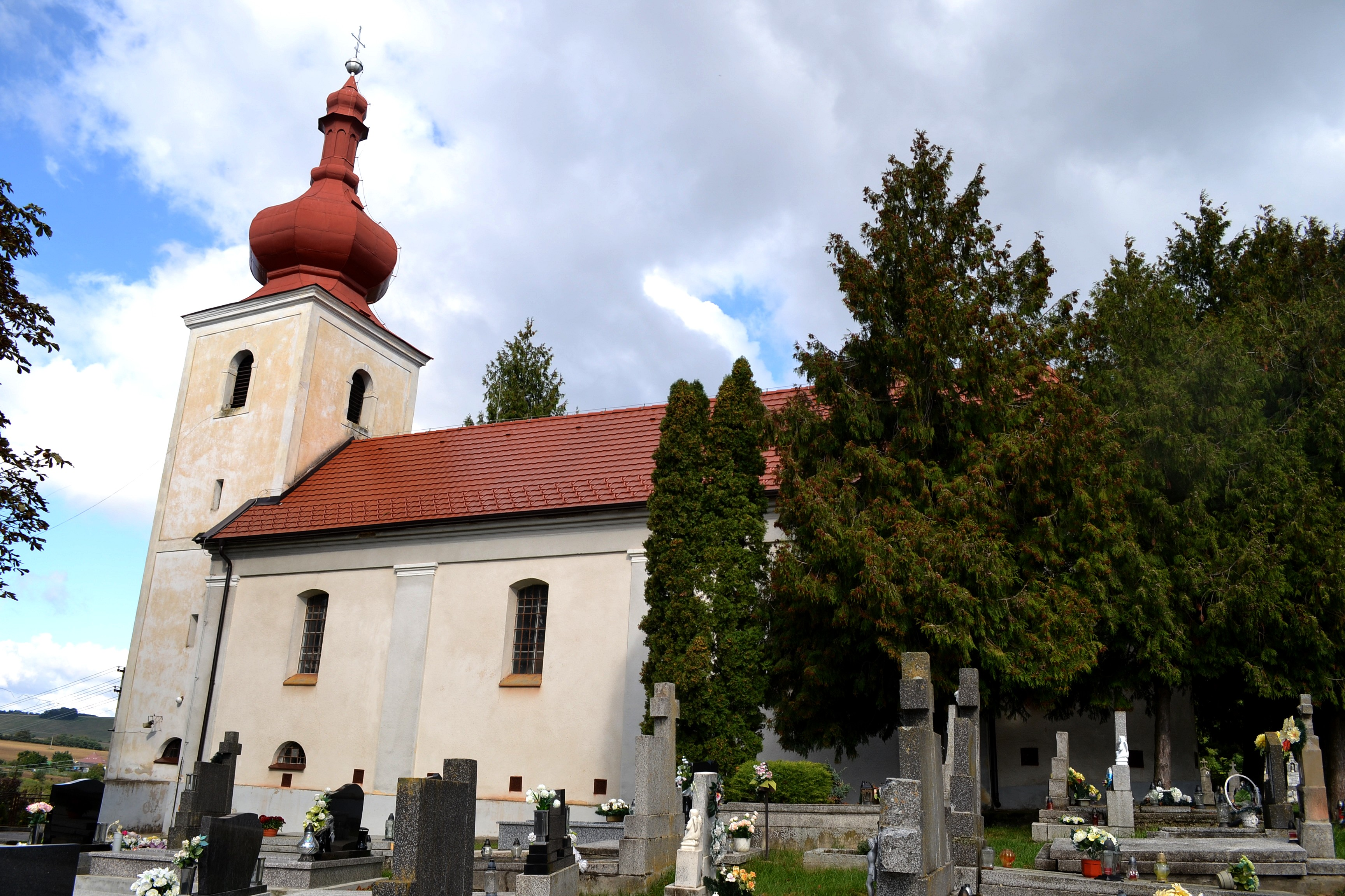 Horné Trhovište (okr. Hlohovec), Kostol svätého Bartolomeja; celkový pohľad